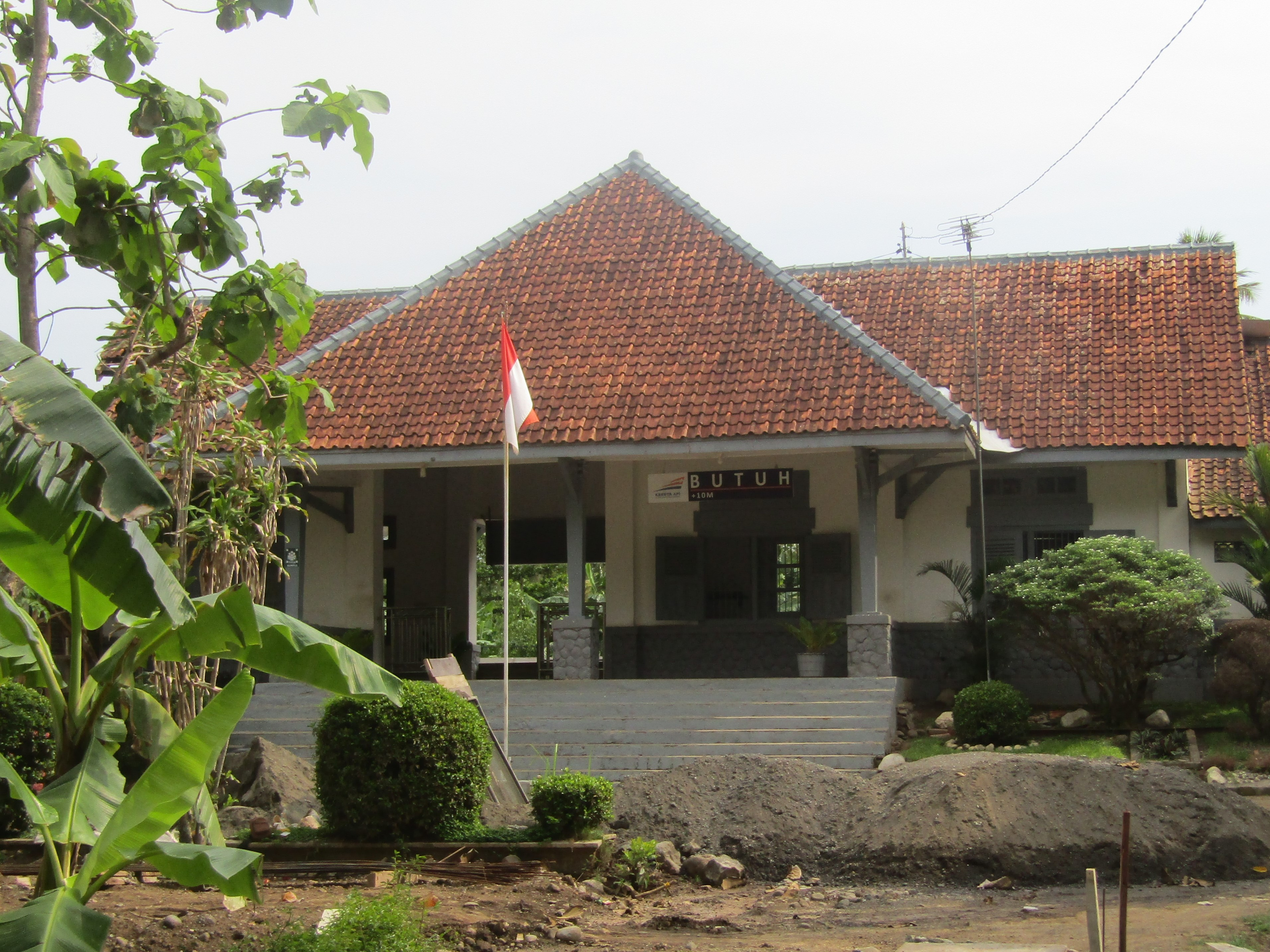 Stasiun Butuh, 2019